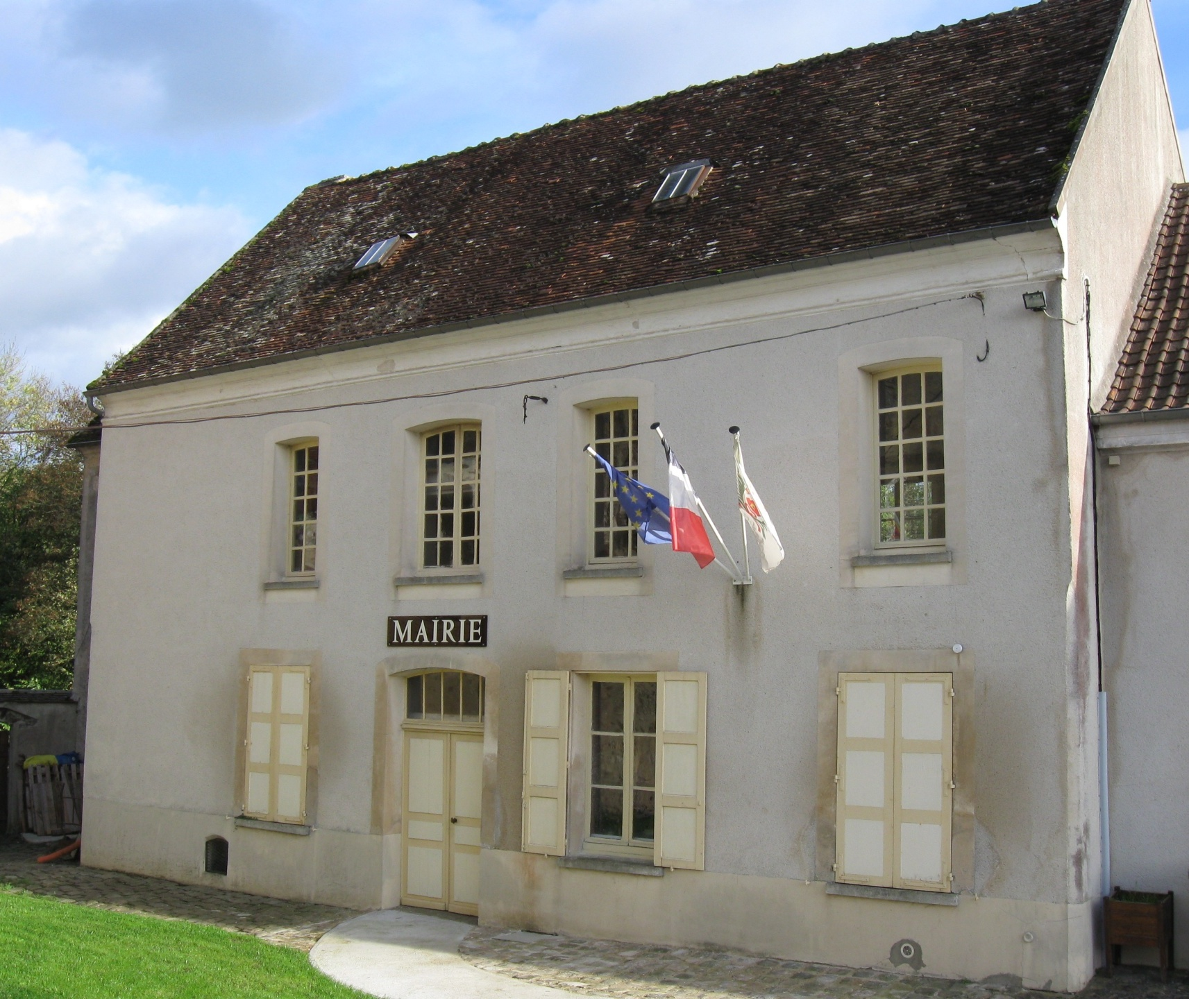 Mairie de Bézu-le-Guéry. (département de l'Aisne, région Picardie).